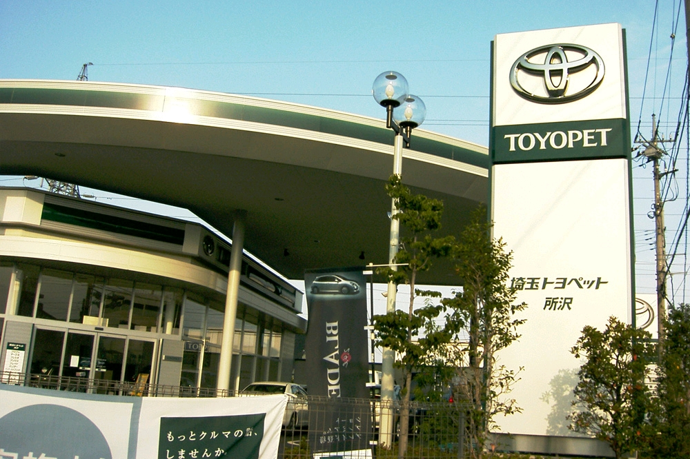 “Toyota_TOYOPET_Car_dealership_Tokorozawa_Saitama”